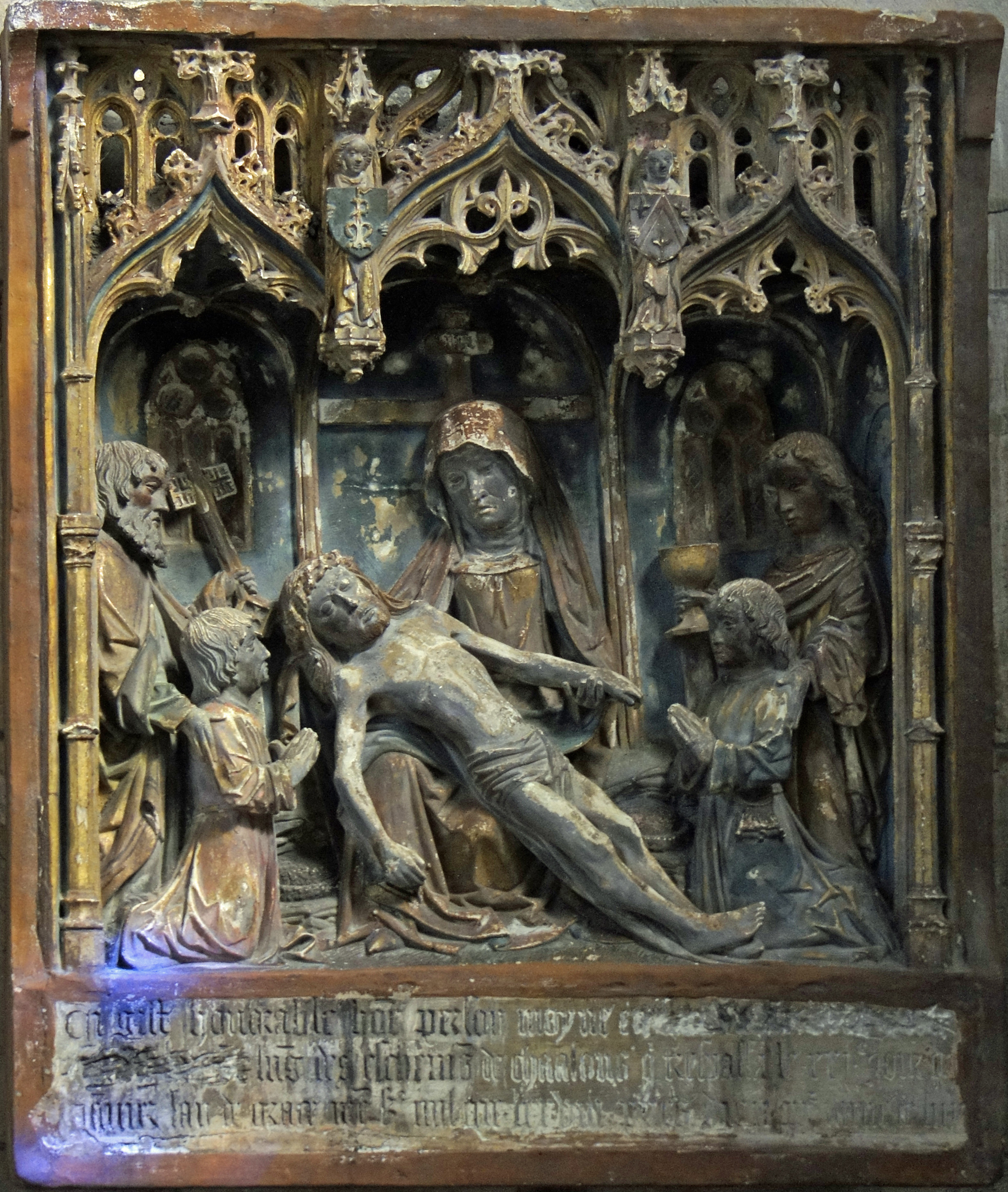 Pieta peinte en mémoire de Pierre et Jean Moynes.